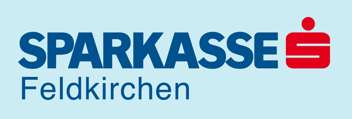 Logo Sparkasse Feldkirchen/Kärnten